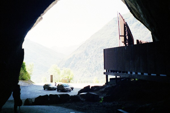 Entrée de la grotte ornée de Niaux en Ariège.